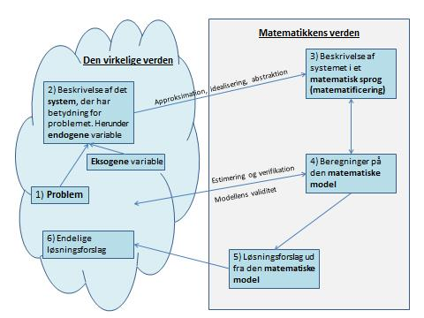 Processen i bygning af en matematisk model